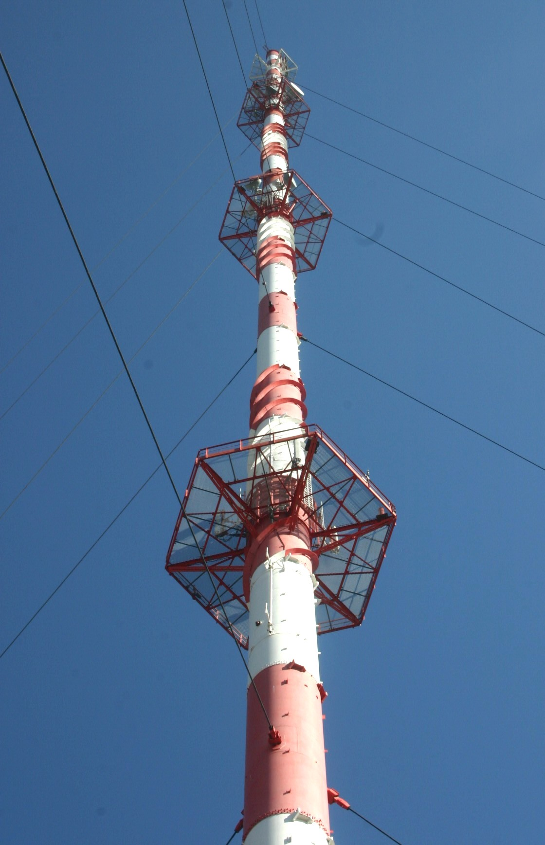 De Sender vun Housen.